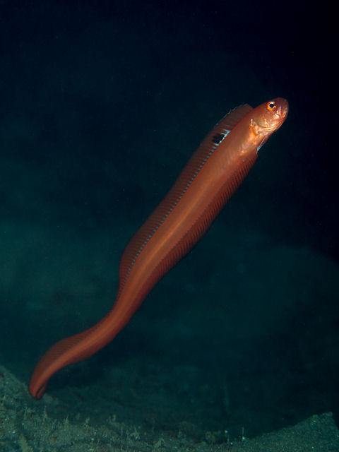 イッテンアカタチ Acanthocepola limbata